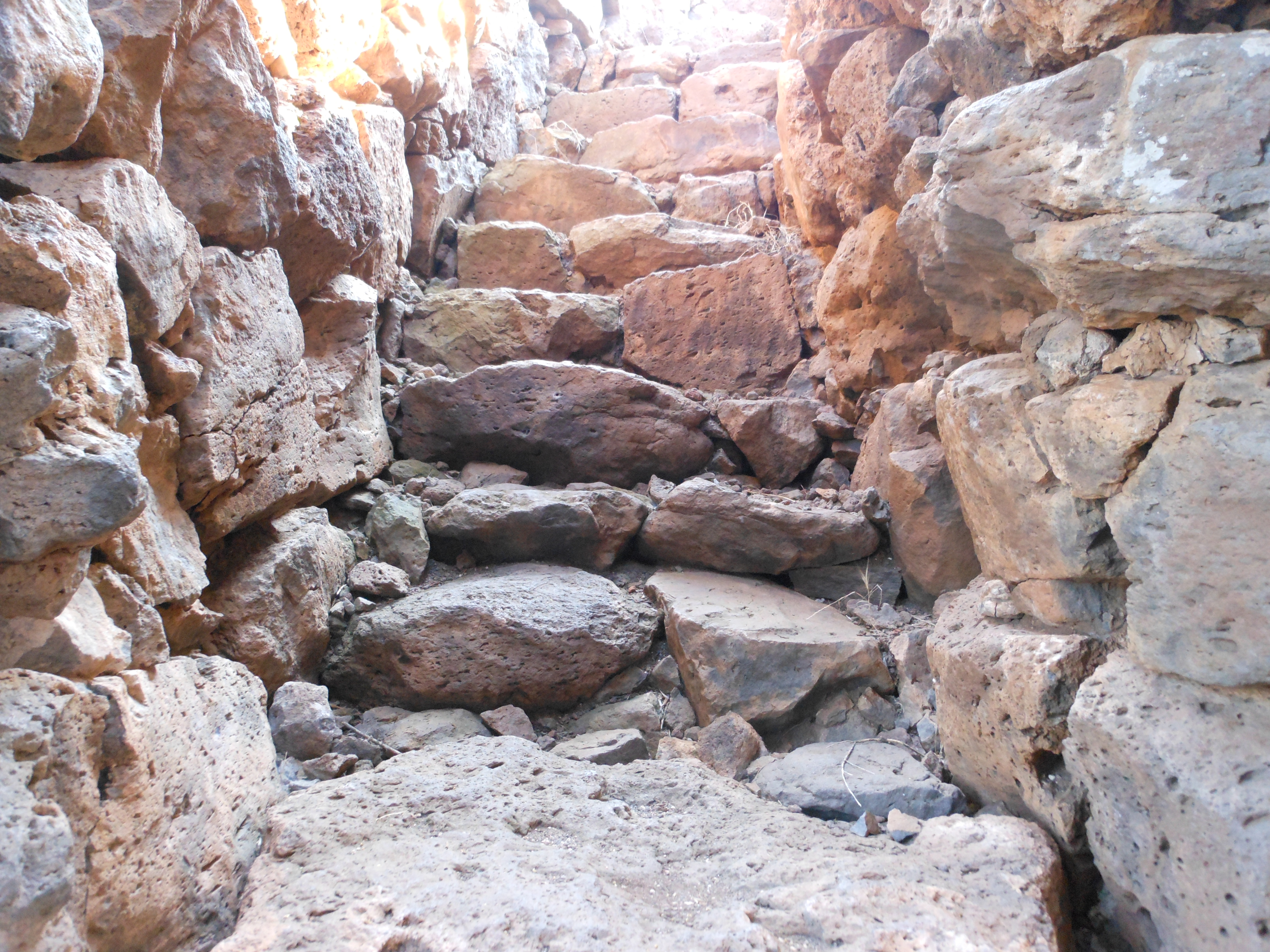 Dorgali - Nuraghe Mannu